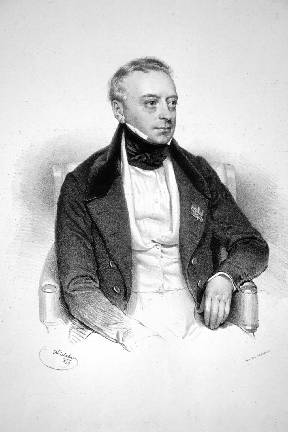 Salomon Meyer Freiherr von Rothschild (1774-1855), Bankier.